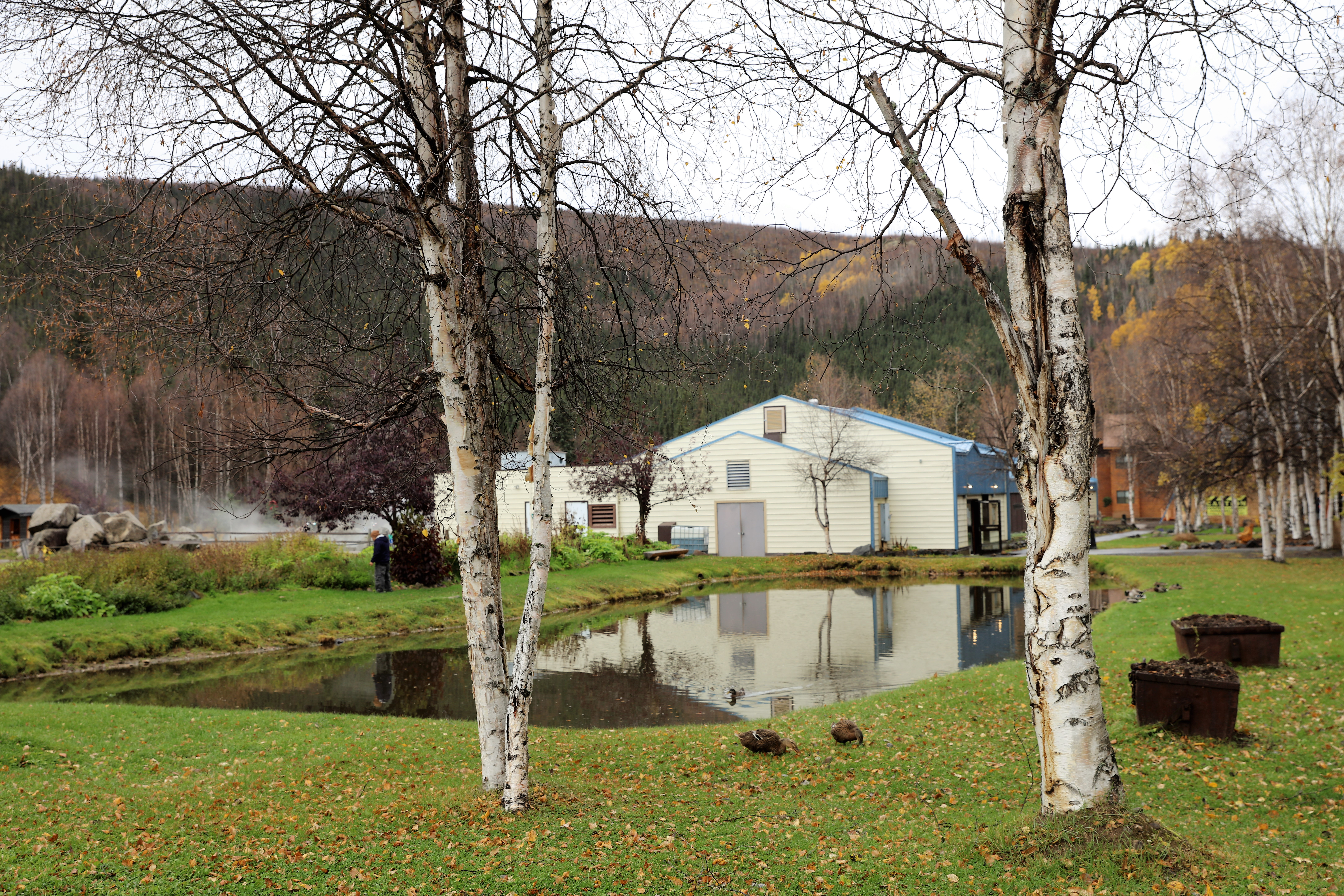 Il parco